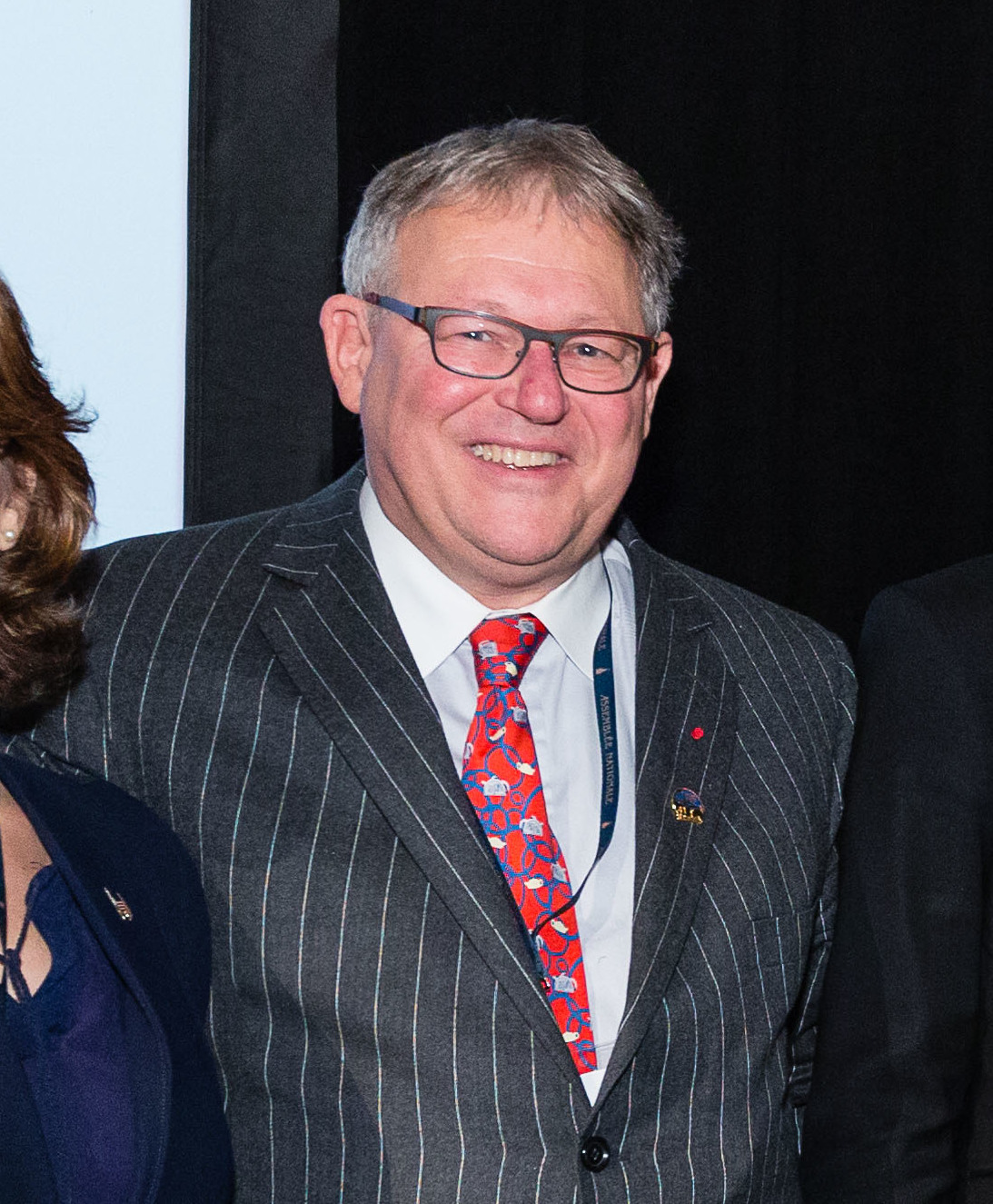 _76A8642